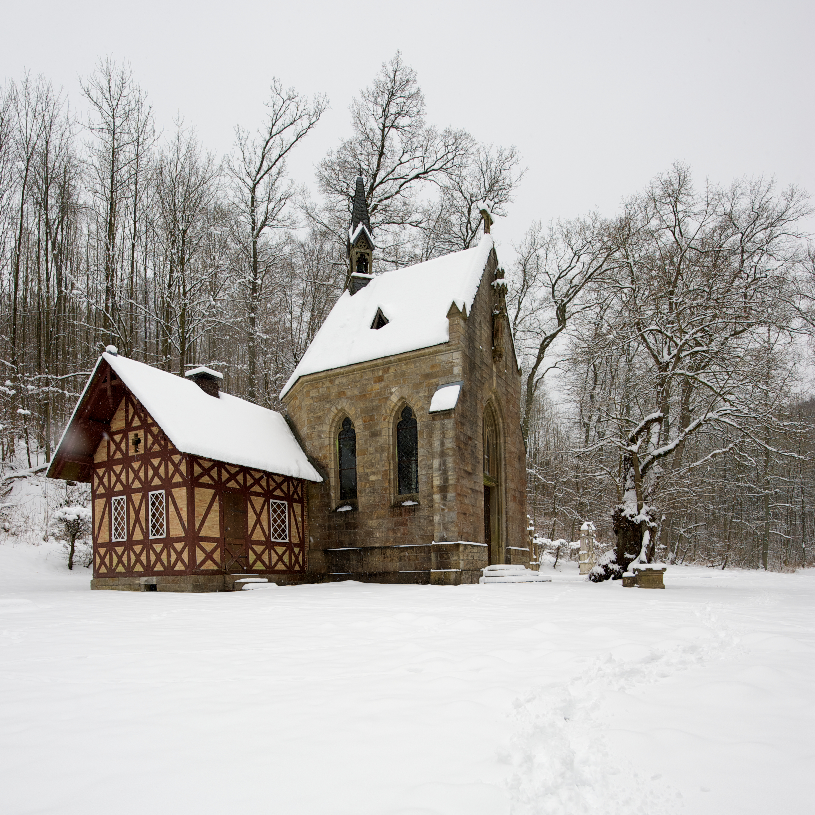 Meinolfuskapelle bei Böddeken im Winter